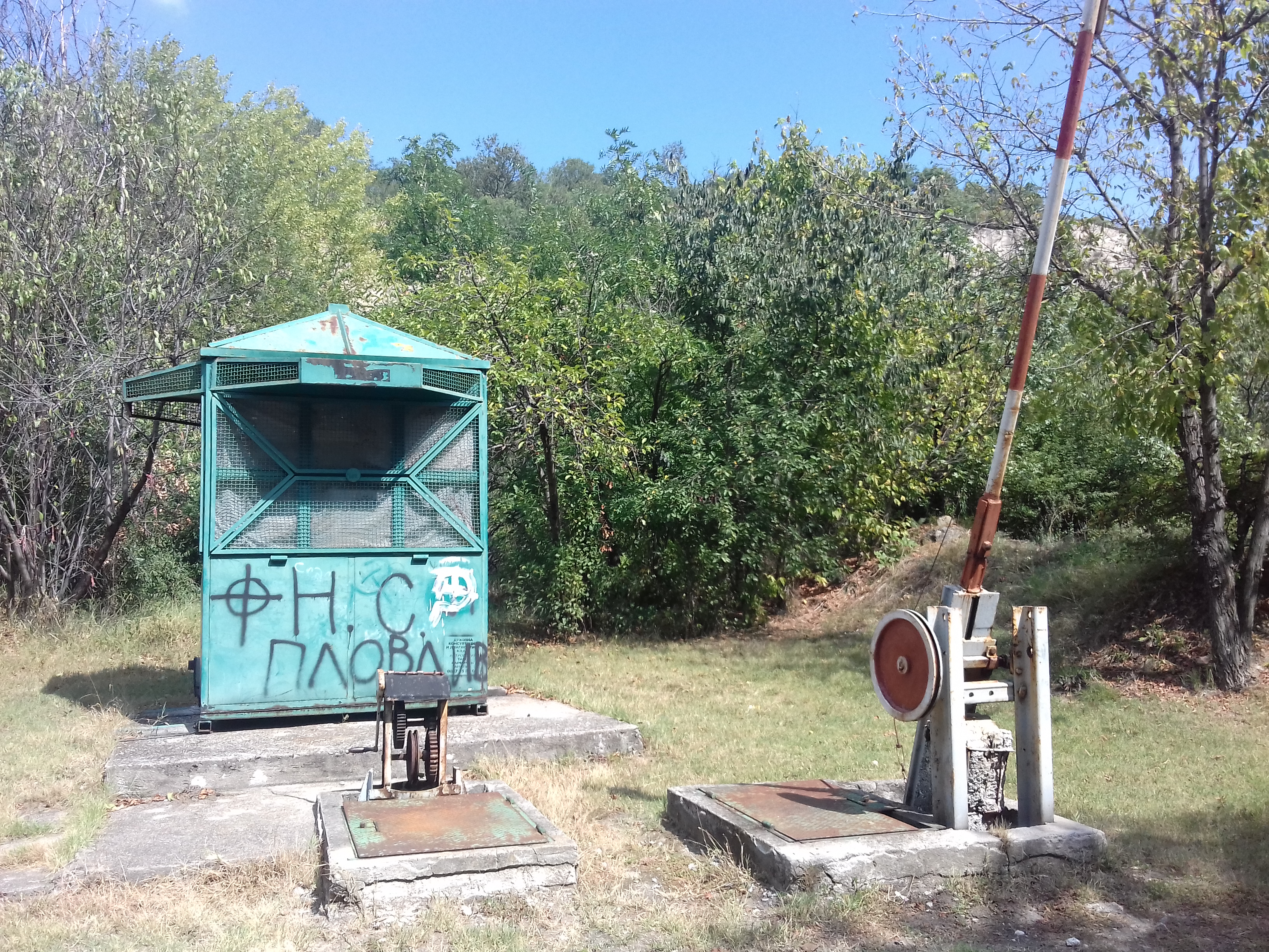 Детската железница в Пловдив.